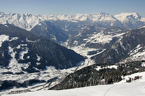 Blick ins Val de Bagnes